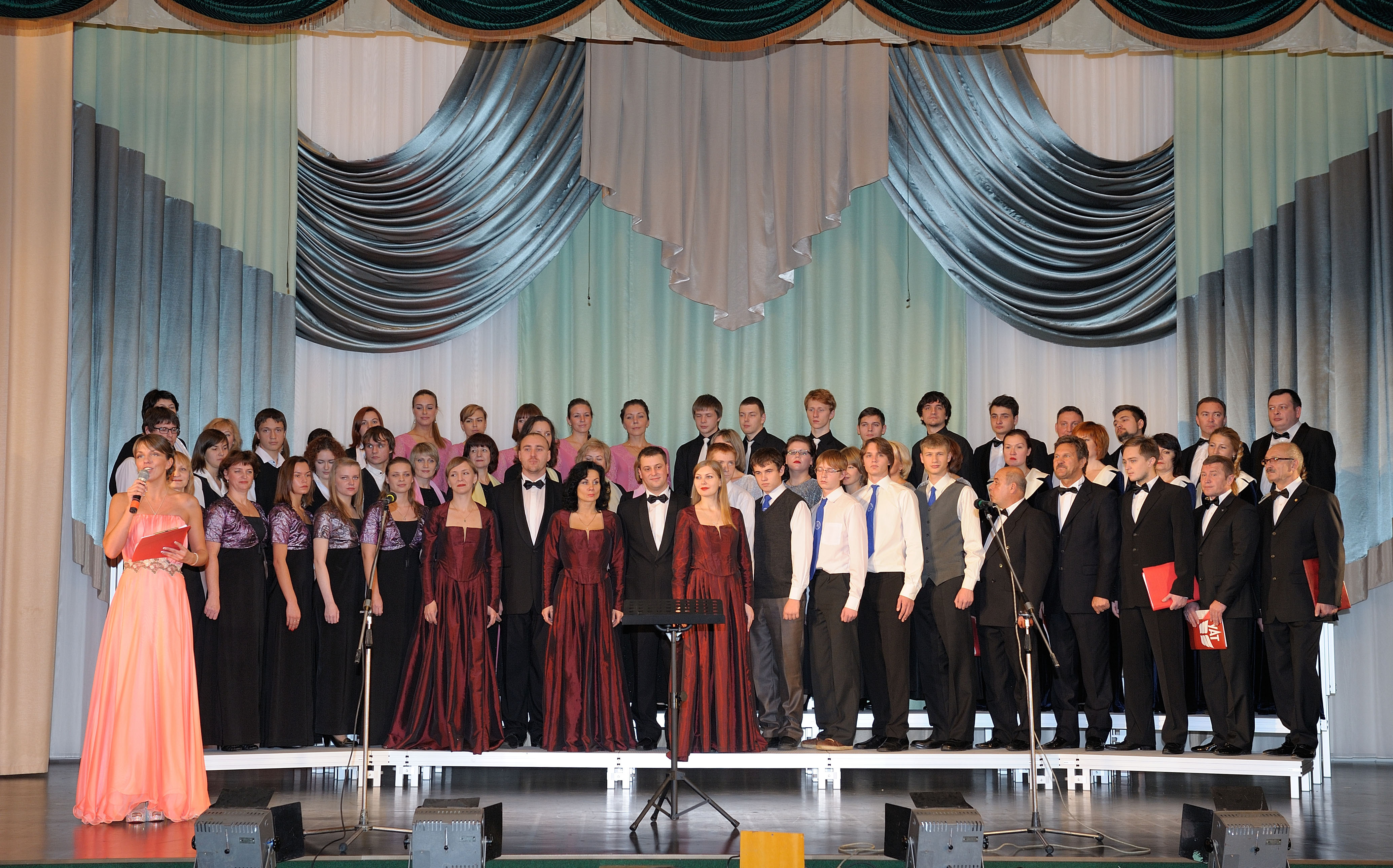 1-й хоровой фестиваль "Энергия музыки"